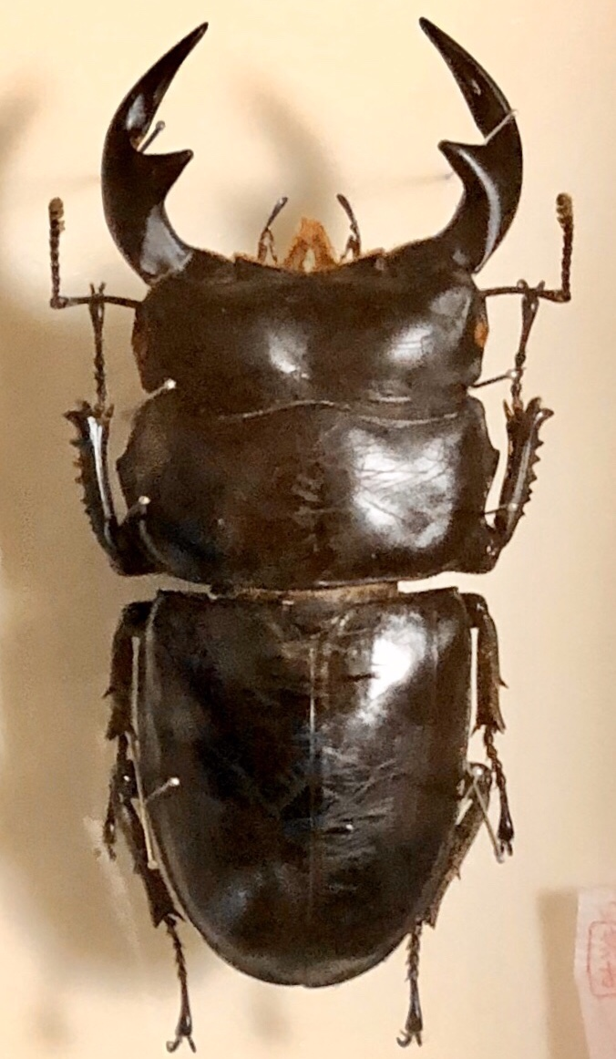 アンタエウス タイ産 86㎜野外1998年ギネス奈良オオクワ